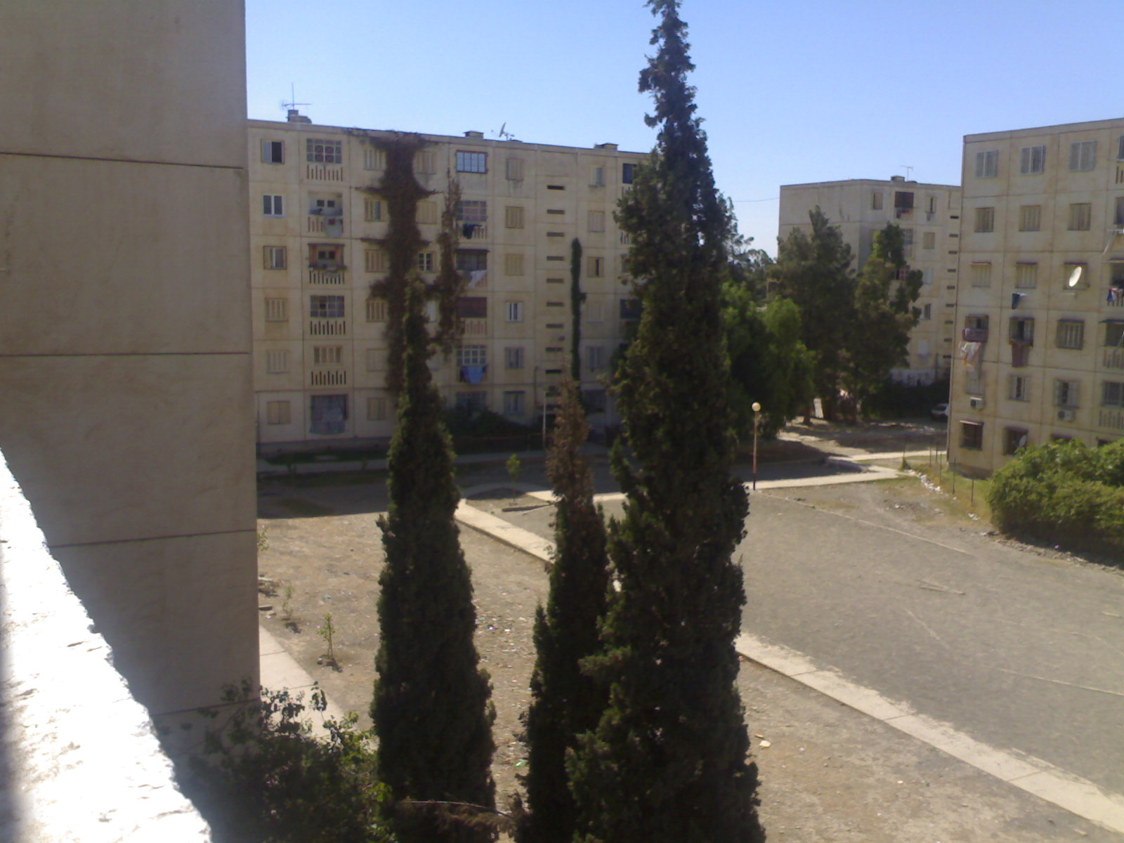 Cité 2004 logements baraki